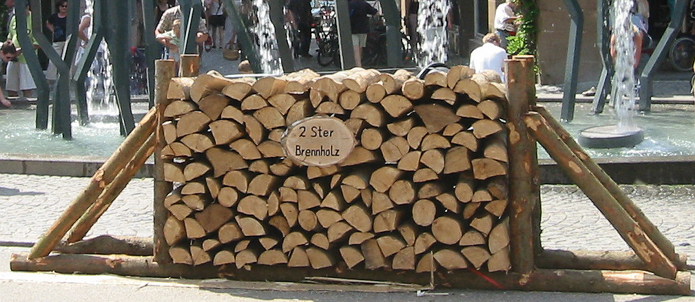 2 Ster Holz, in Ravensburg (Festlichkeiten zu "800 Jahre Markt in Ravensburg", 15. Juni 2002)